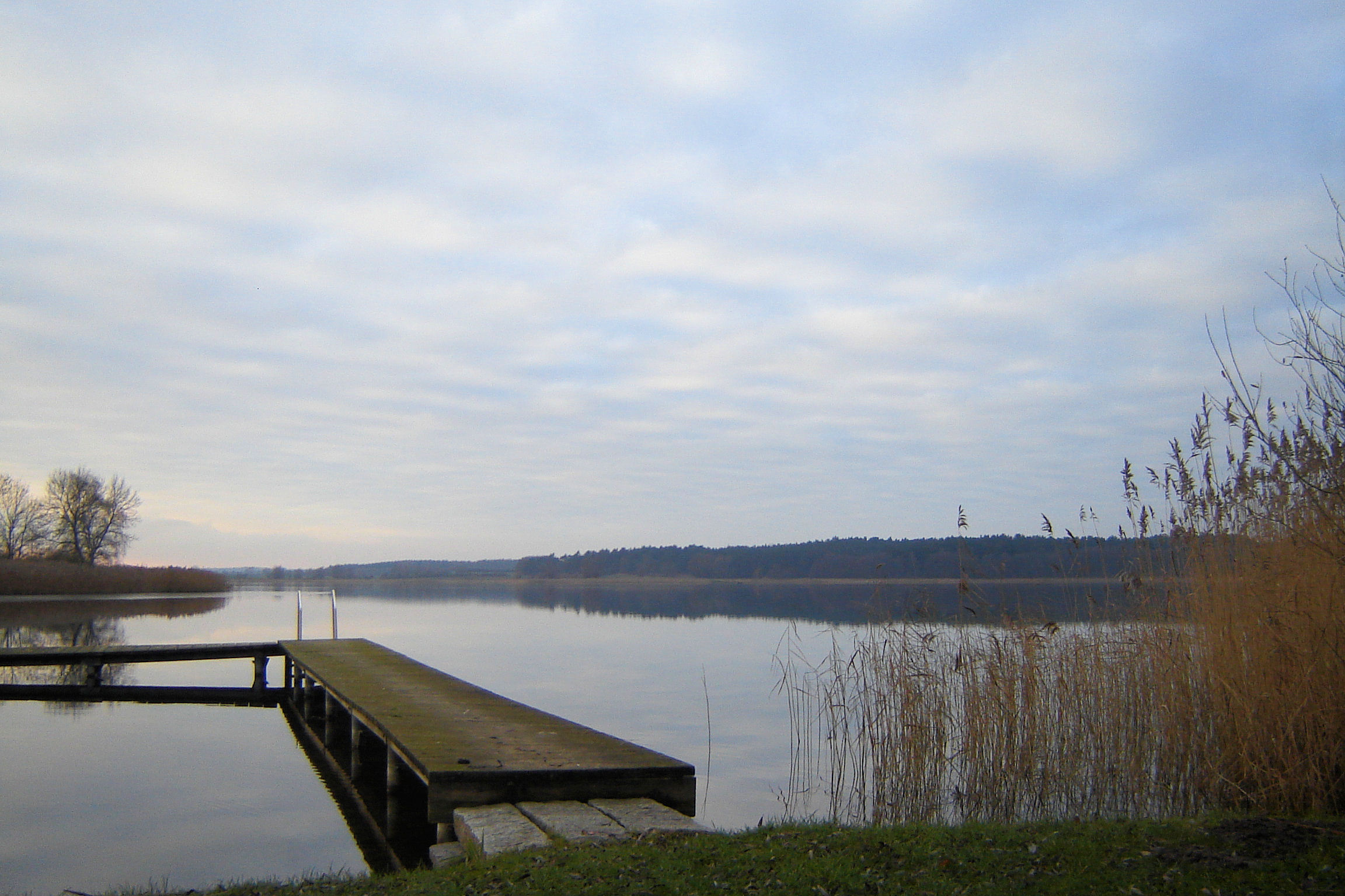 Blick von Blankenberg auf den Tempziner See